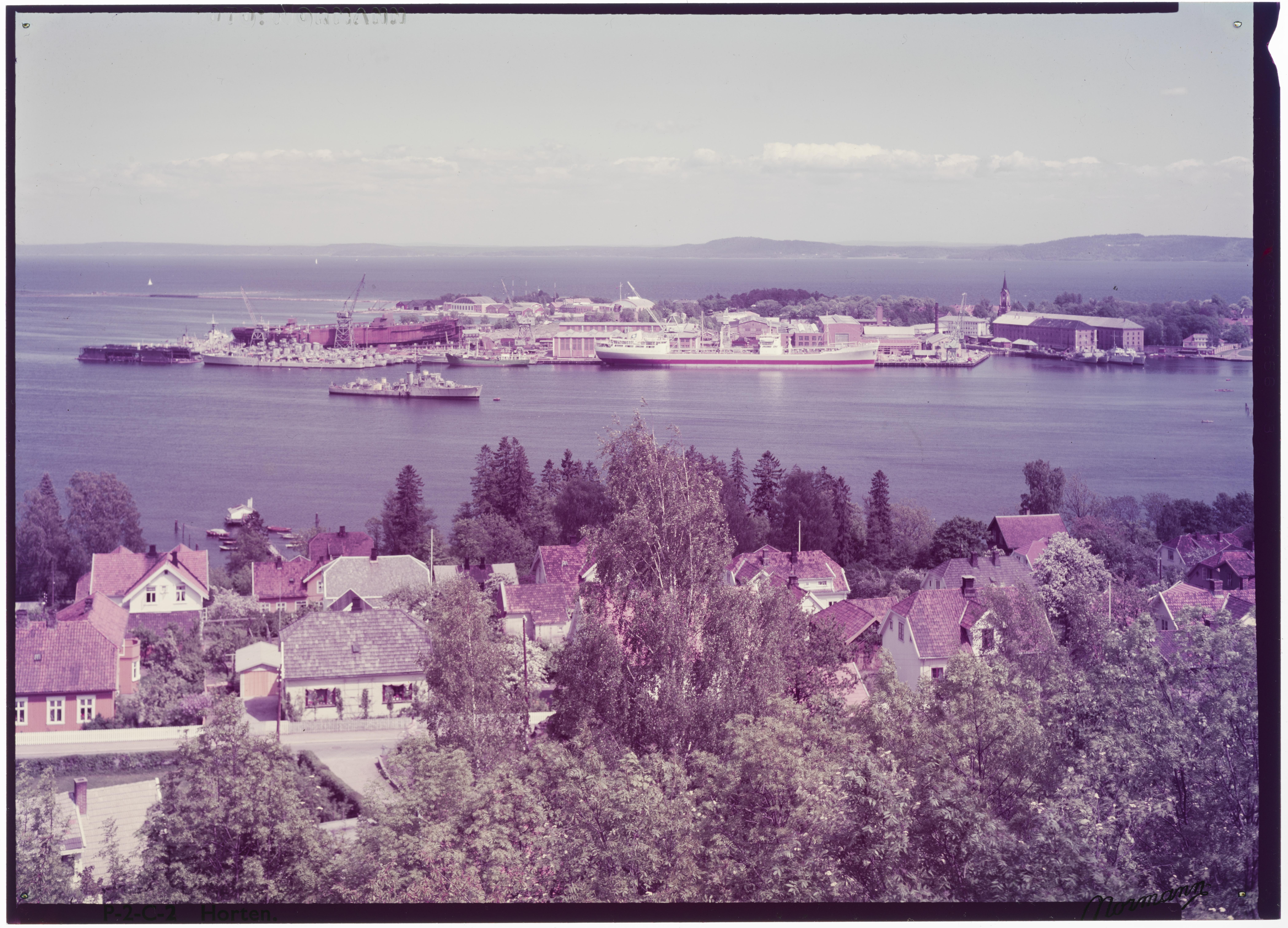 Bildet er hentet fra Nasjonalbibliotekets bildesamling. Anmerkninger til bildet var: Tittel er hentet fra emballasje. Horten, Horten, Vestfold